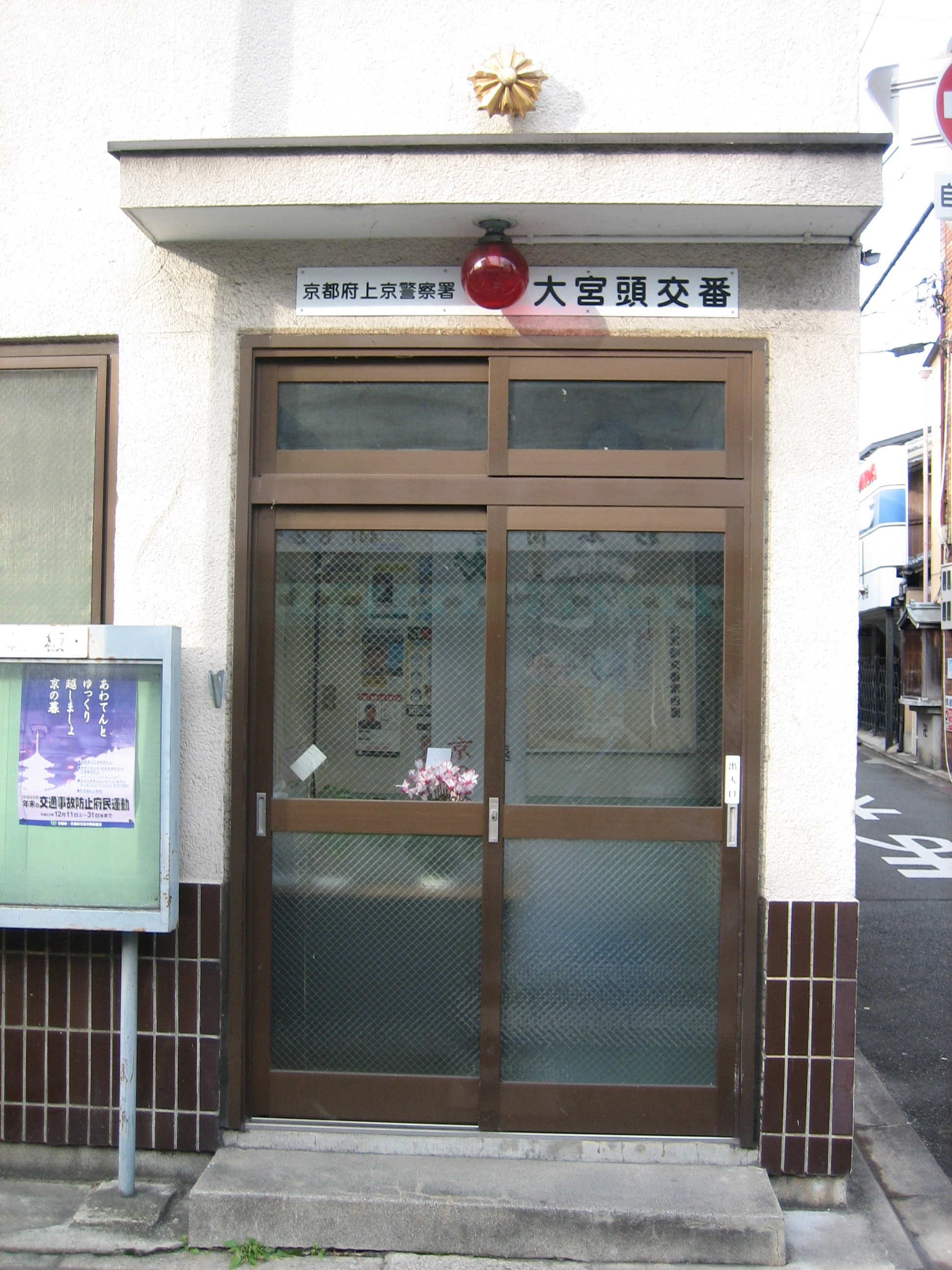 大宮通を京都市上京区仲之町で撮影